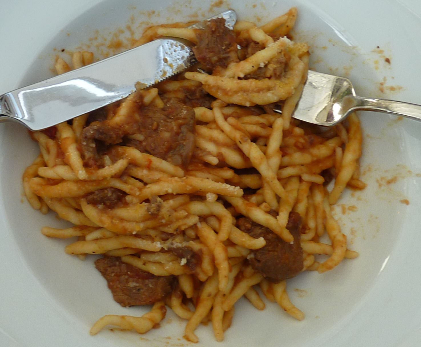 Trofie mit Spitzen vom Rinderfilet